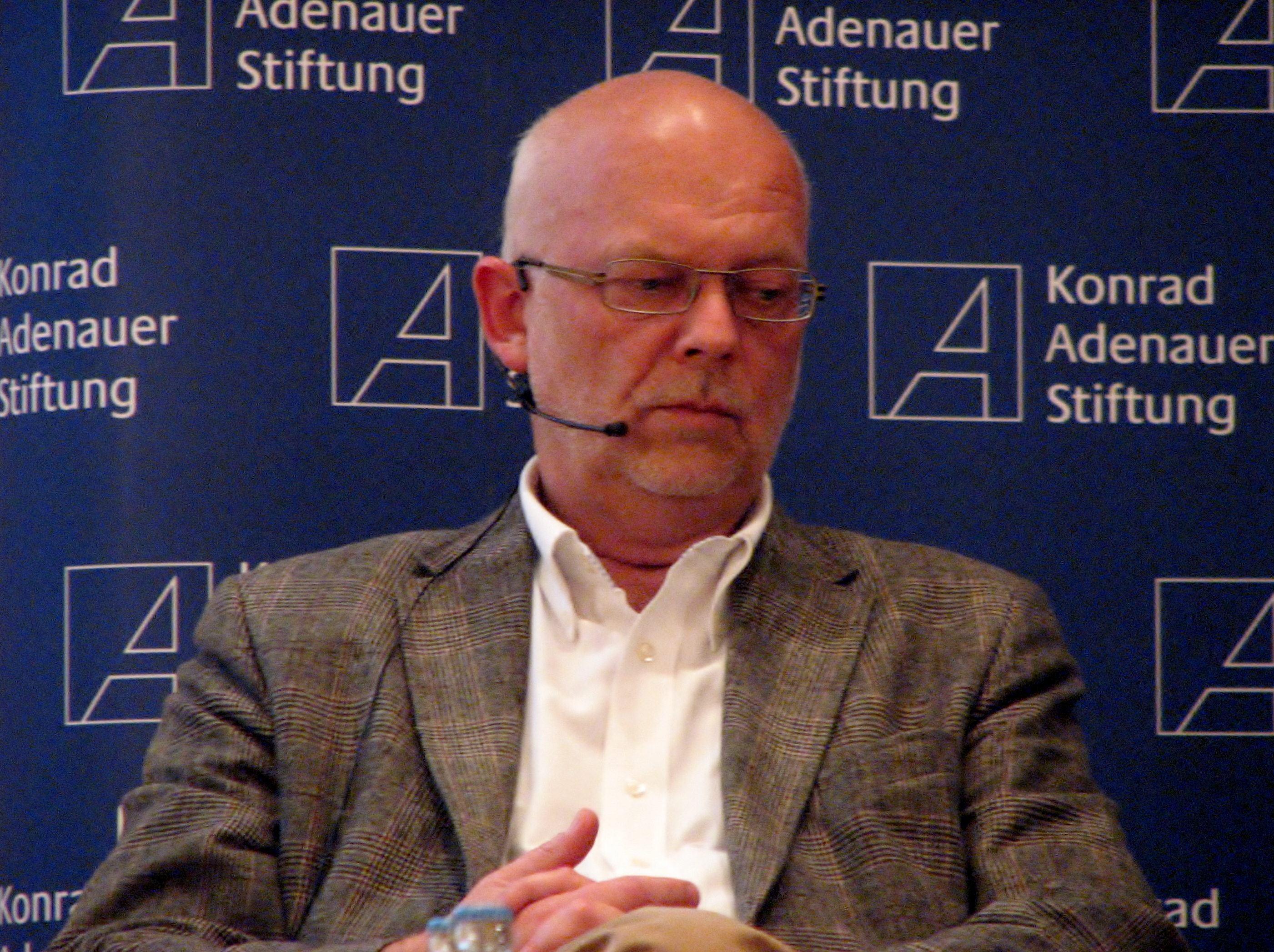 Mart Meri esinemas IRL-i hariduskonverentsil